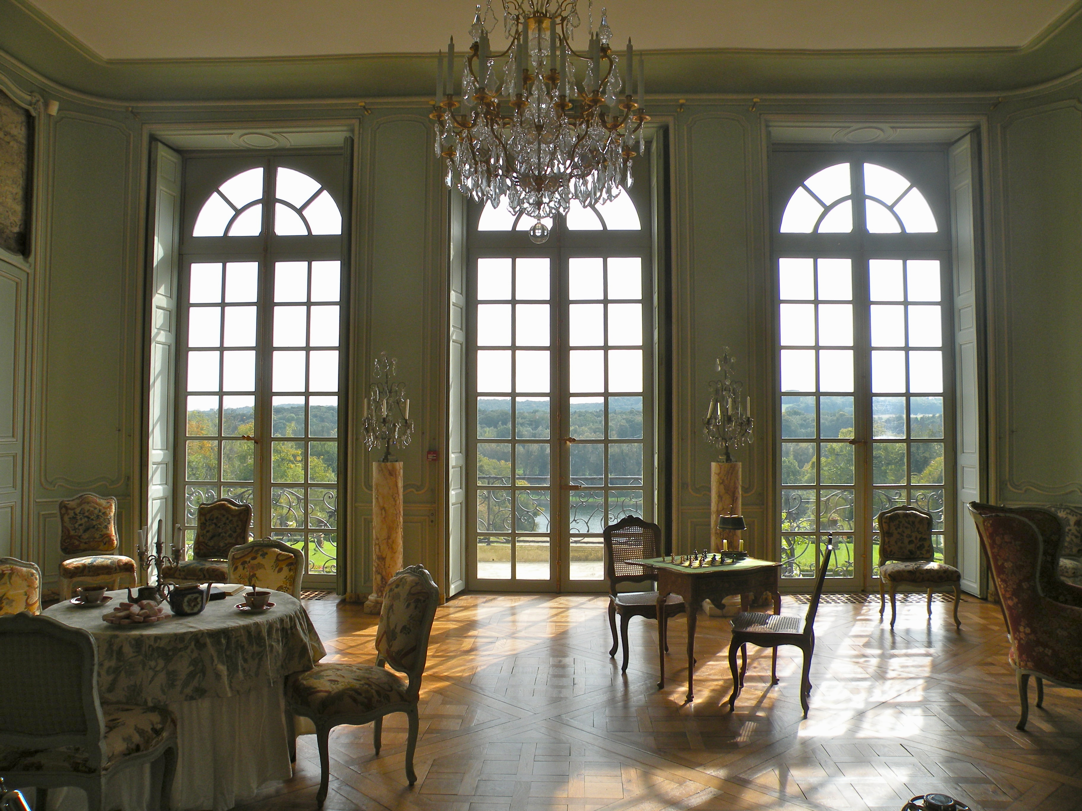 Domaine de Villarceaux - Château du haut - Grand salon